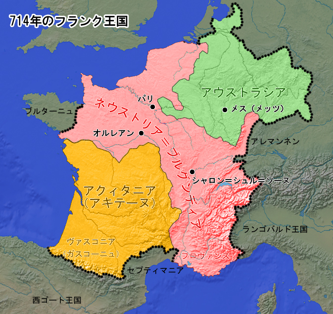 714年のフランク王国の分王国。